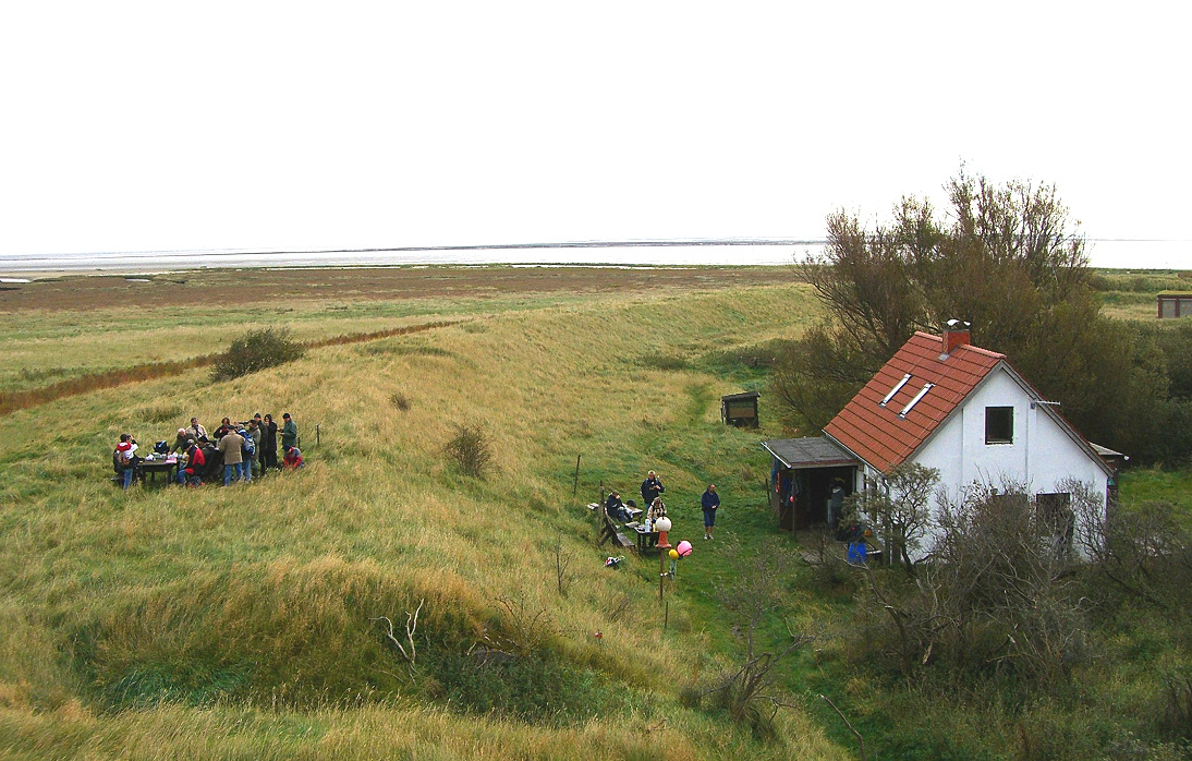 Station auf Mellum